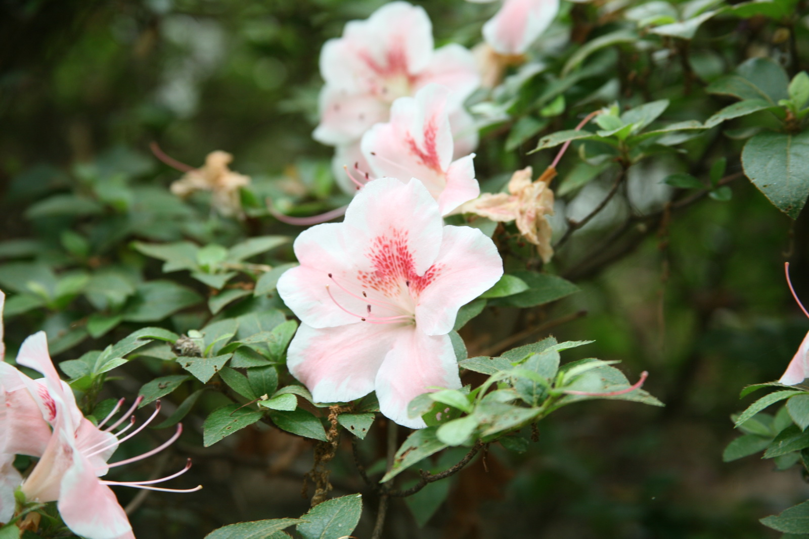 Satsuki Azalea (Rhododendron) 'Issho no haru'